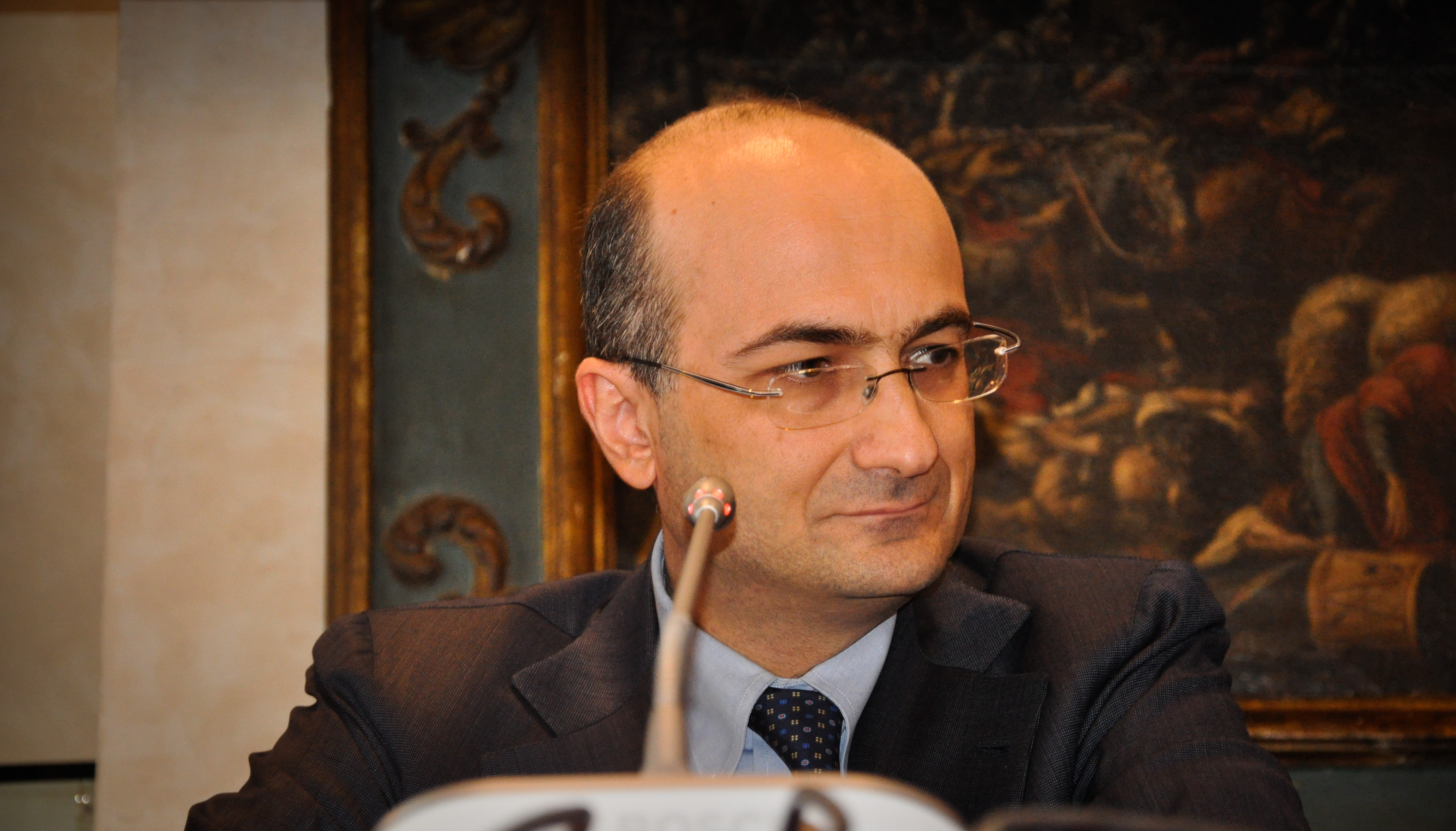 Antonio Preziosi